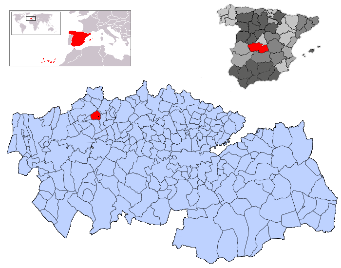 Hinojosa de San Vicente en la provincia de Toledo